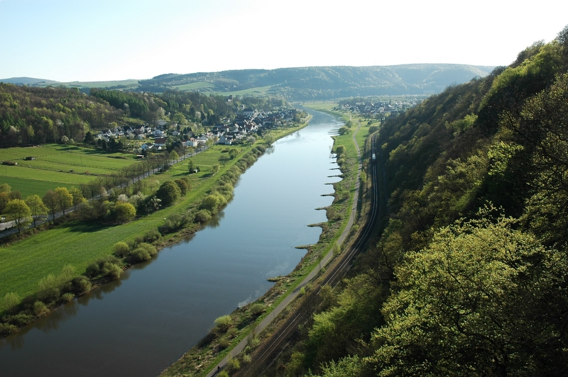 Blick von den Hannoverschen Klippen Weserabwärts Richtung Würgassen